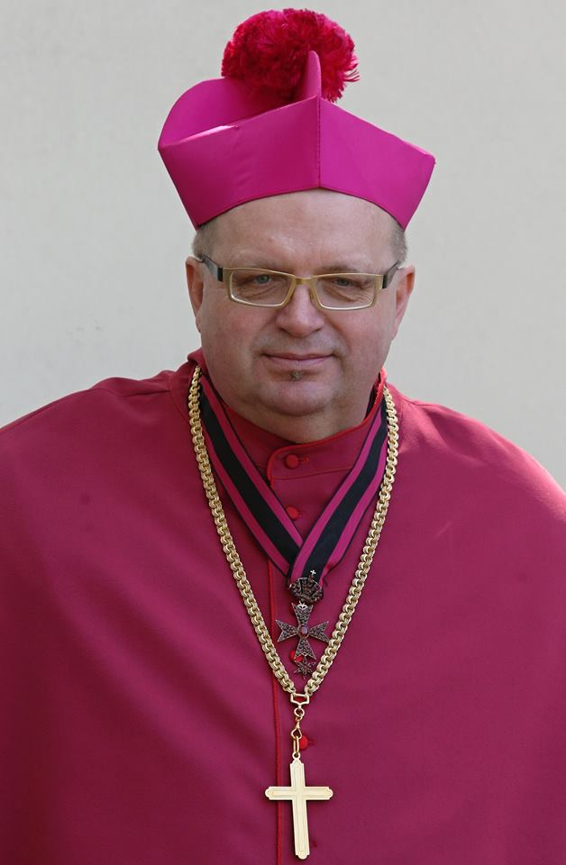 J.M. can. Jiří Hladík, probošt, foto pořízeno se svolením ze soukromého archivu J. Hladíka.